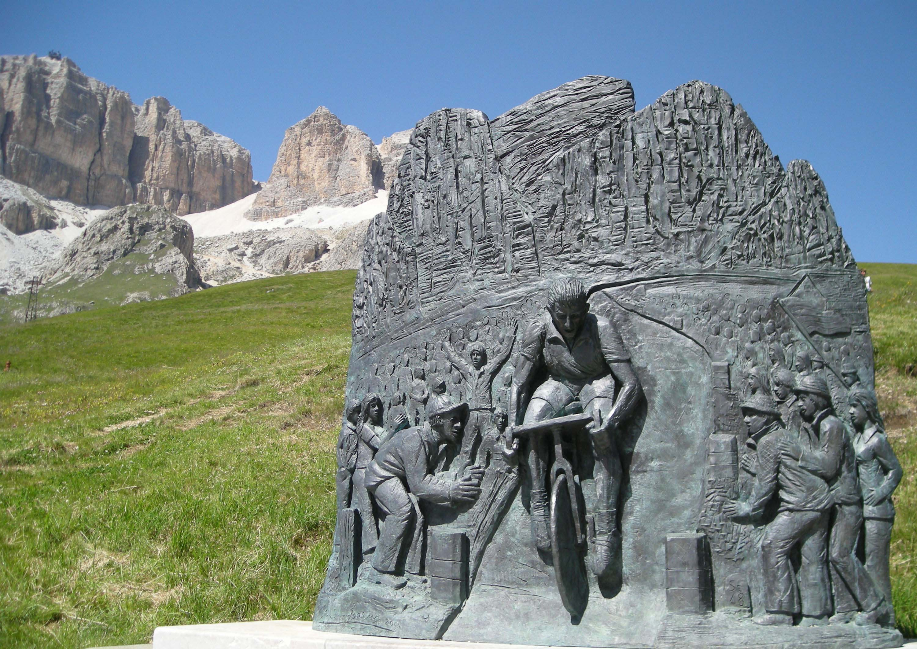 Monument en hommage au champion cycliste Fausto Coppi, érigé le 2 juillet 2000 à Pordoijoch (Dolomites, Italie) par la commune de Canazei.